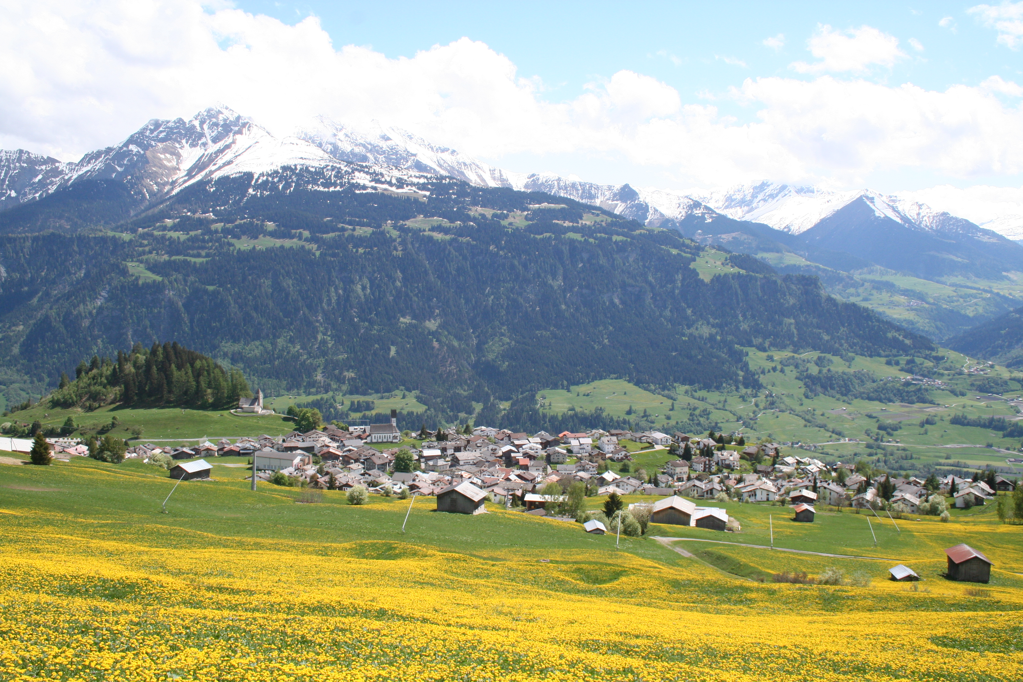 Falera im Mai 2009